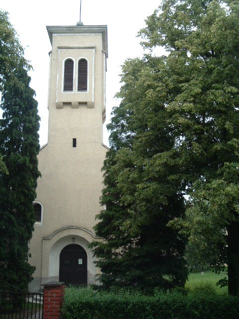 Roman Catholic Church in Vassurány, Hungary. Nagyboldogasszony római katolikus templom